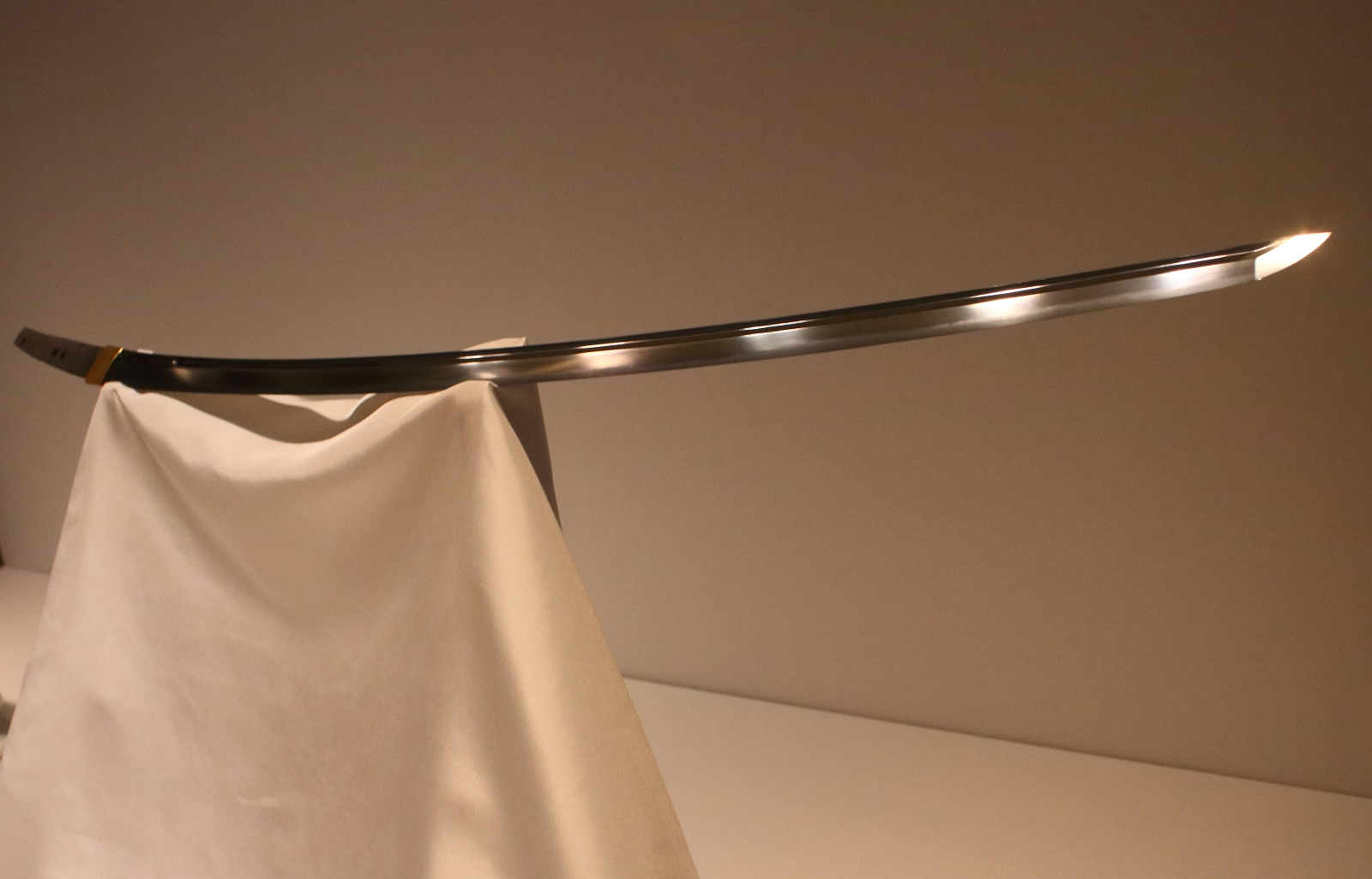 太刀 - 銘「備前国友成造」古備前友成（国宝）、平安時代・11-12世紀。東京国立博物館